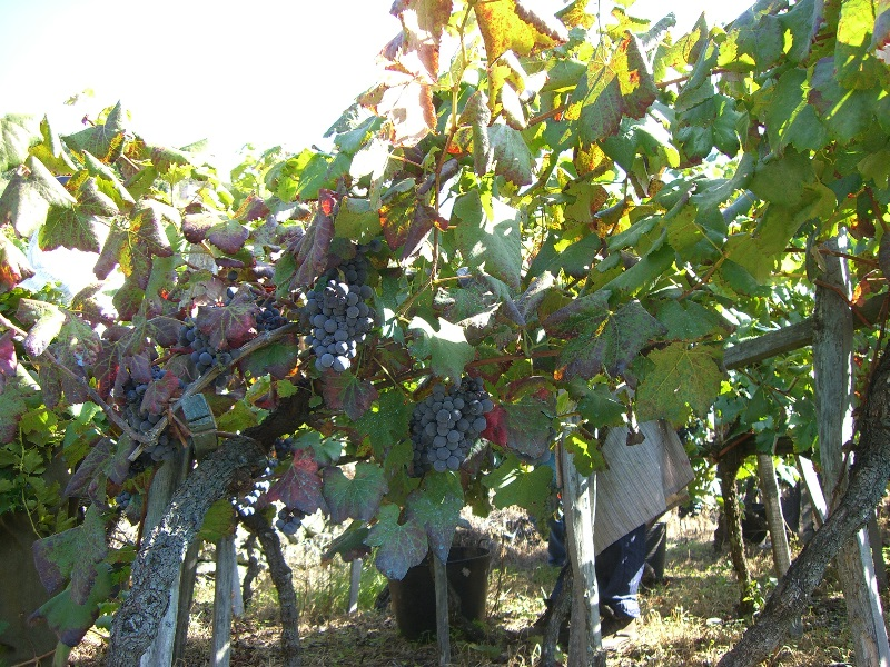 A Ribeiriña, Oleiros, Carballedo